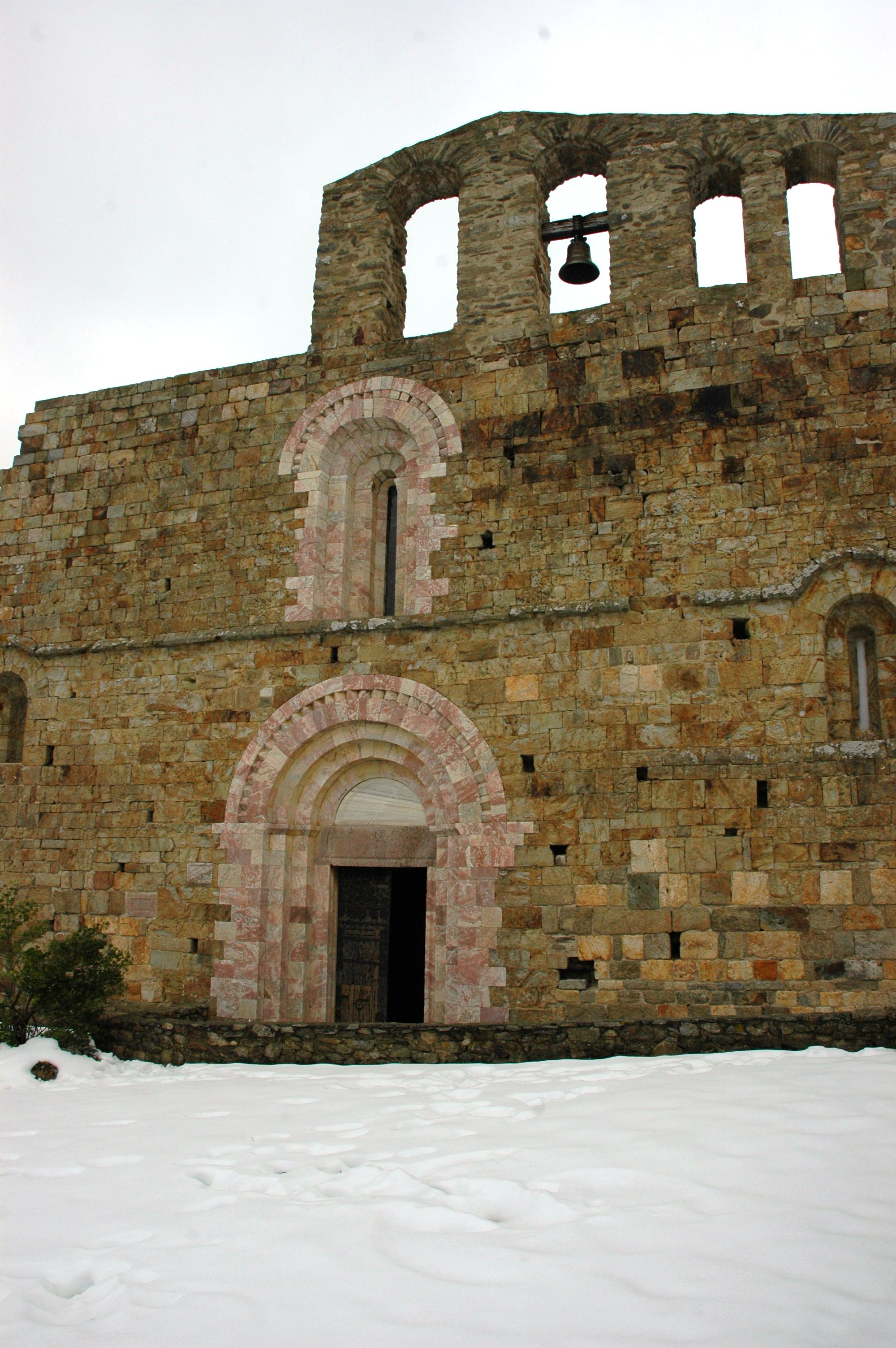 Priorat de Marcèvol - Façana